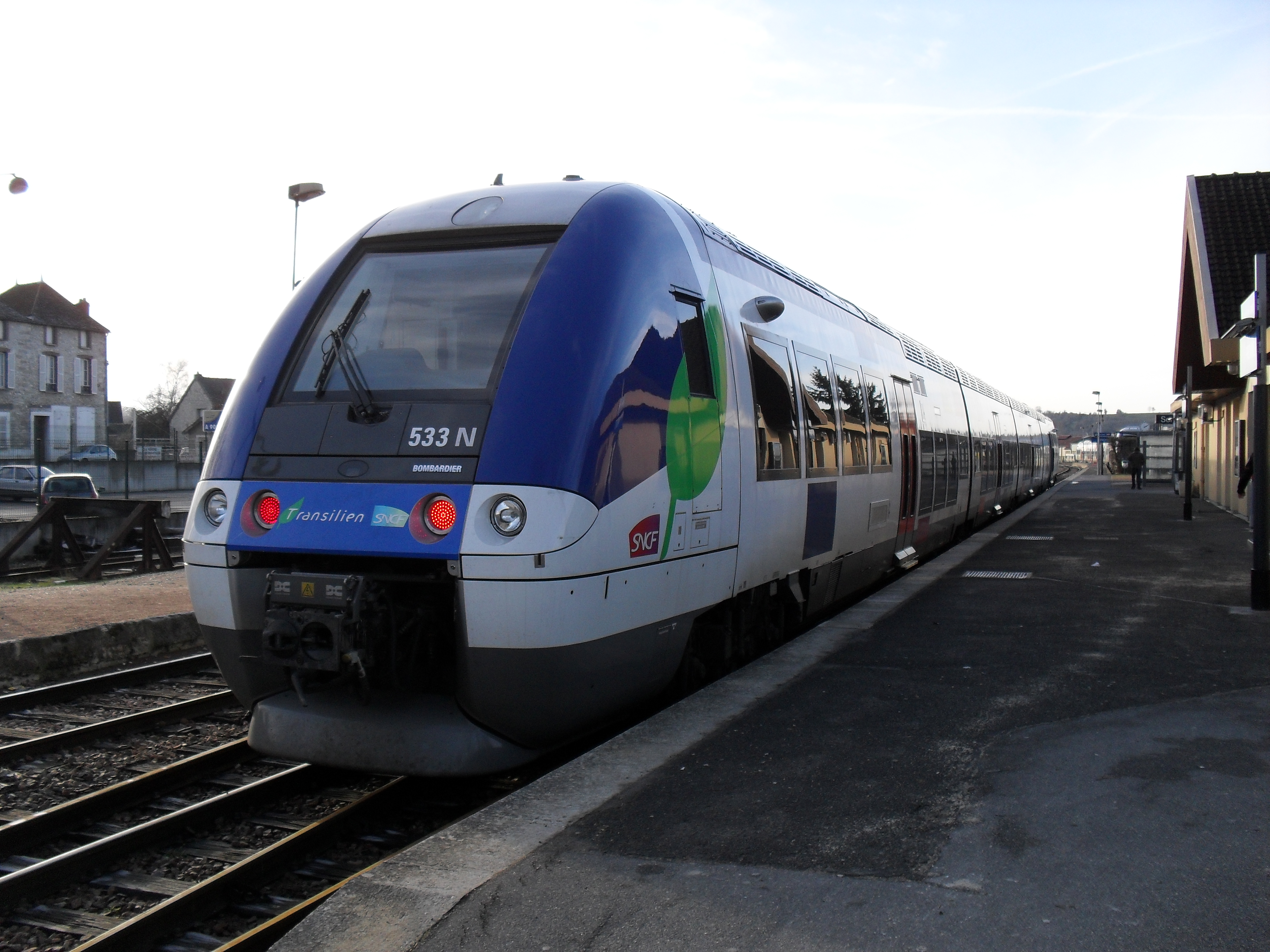 B 82500 Transilien à Provins